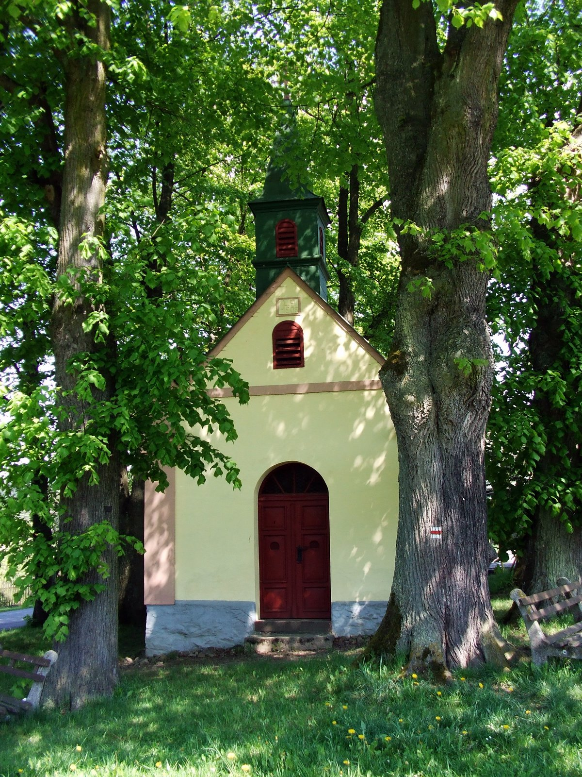 kaplička-Podzámčí